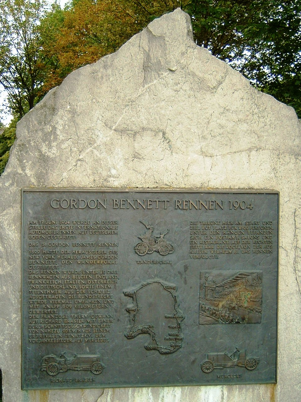 Gedenkstein mit Infotafel zum Rennen 1904 am Kastell Saalburg